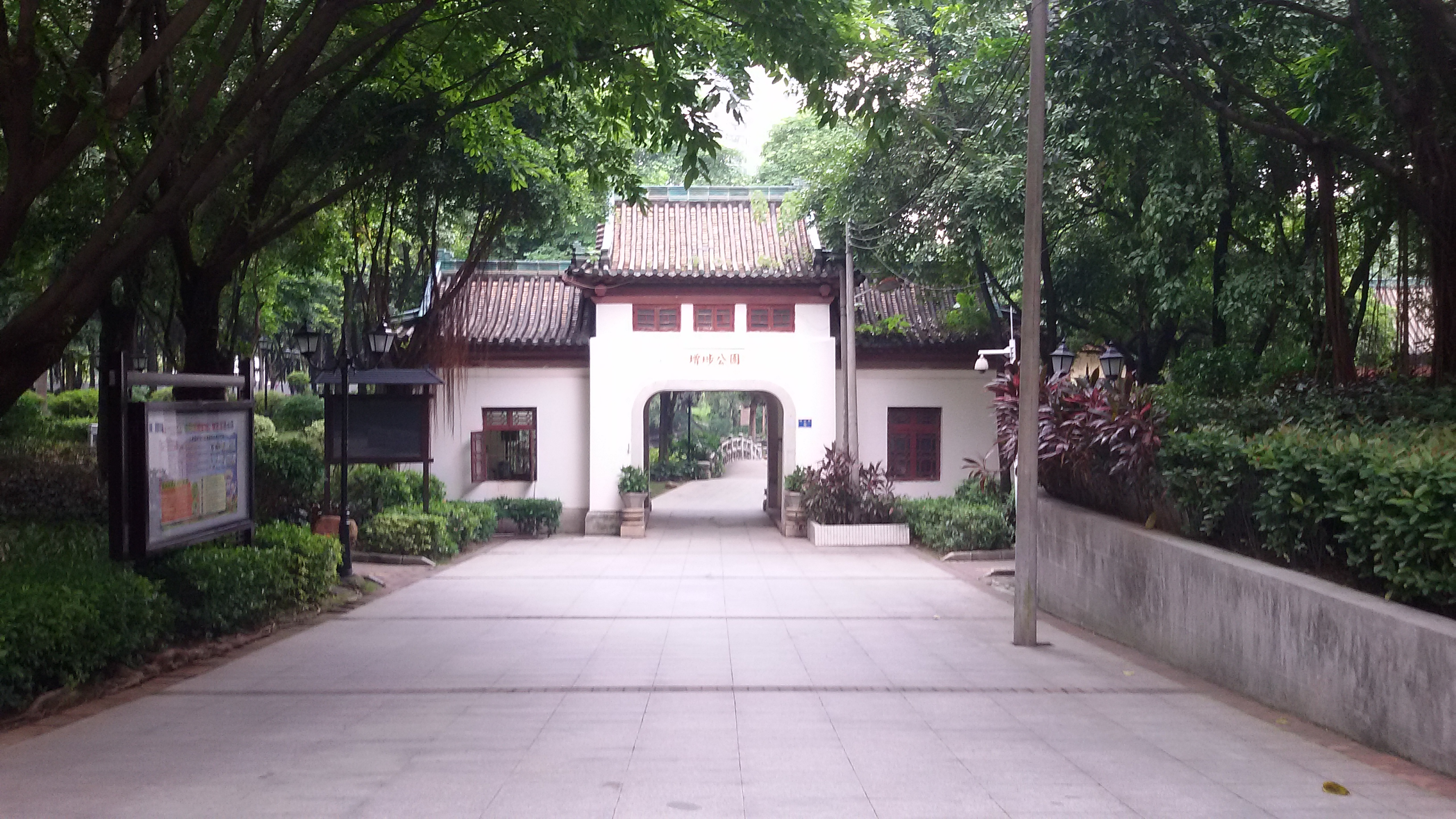 粵語: 增埗公園南門附近嘅牌坊